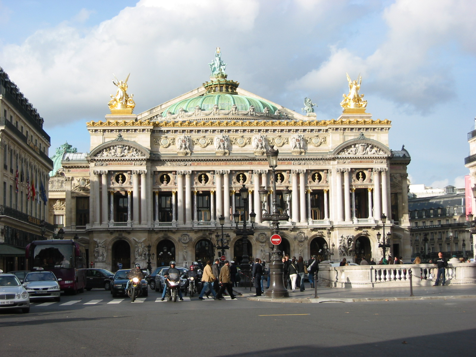 Zelf gemaakt